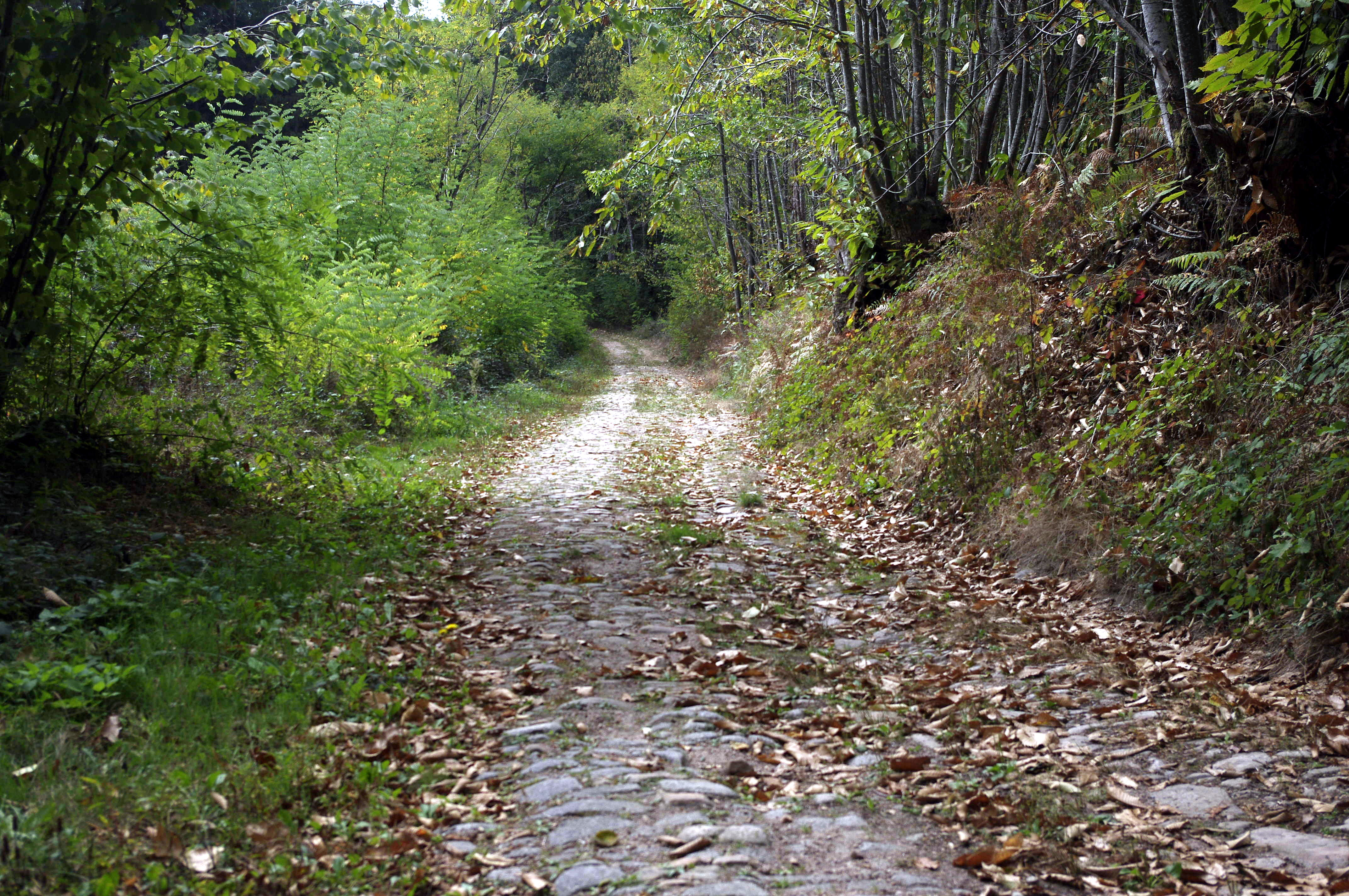 La voie romaine de Pluviers, commune Piégut-Pluviers,Dordogne, France.